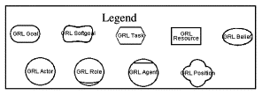 Goal-oriented Requirements Language legend